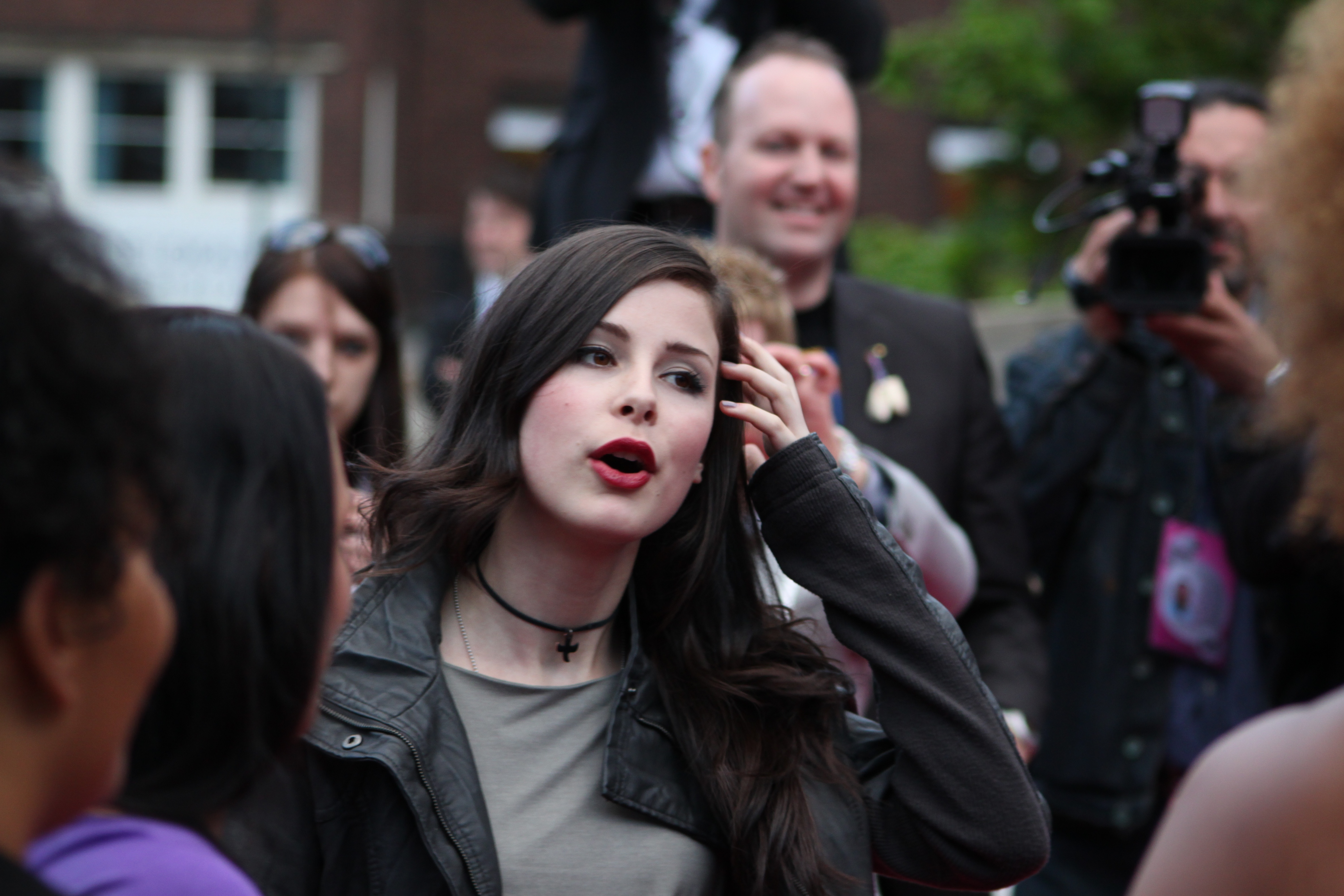 Foto: Vincent Hasselgård, Aktiv I Oslo.no